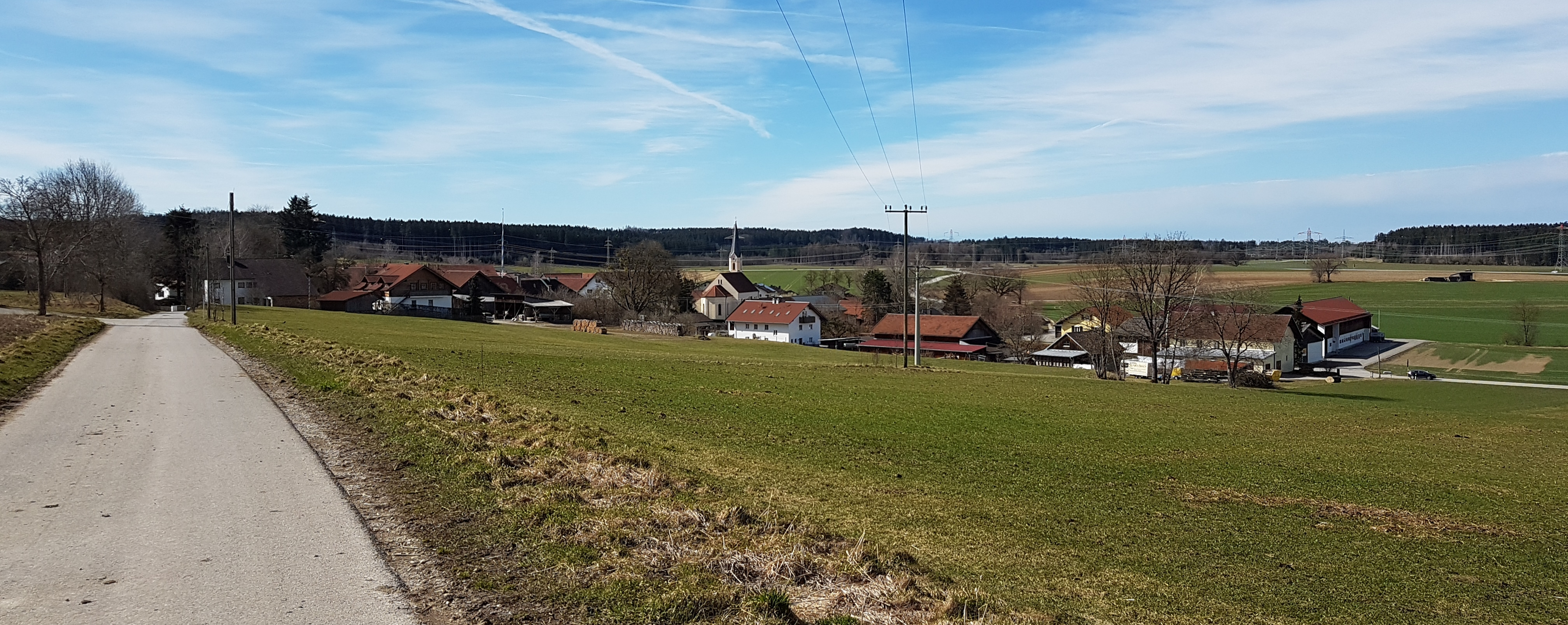 Oberbrunn (Gauting), Ortsansicht von Nordosten.